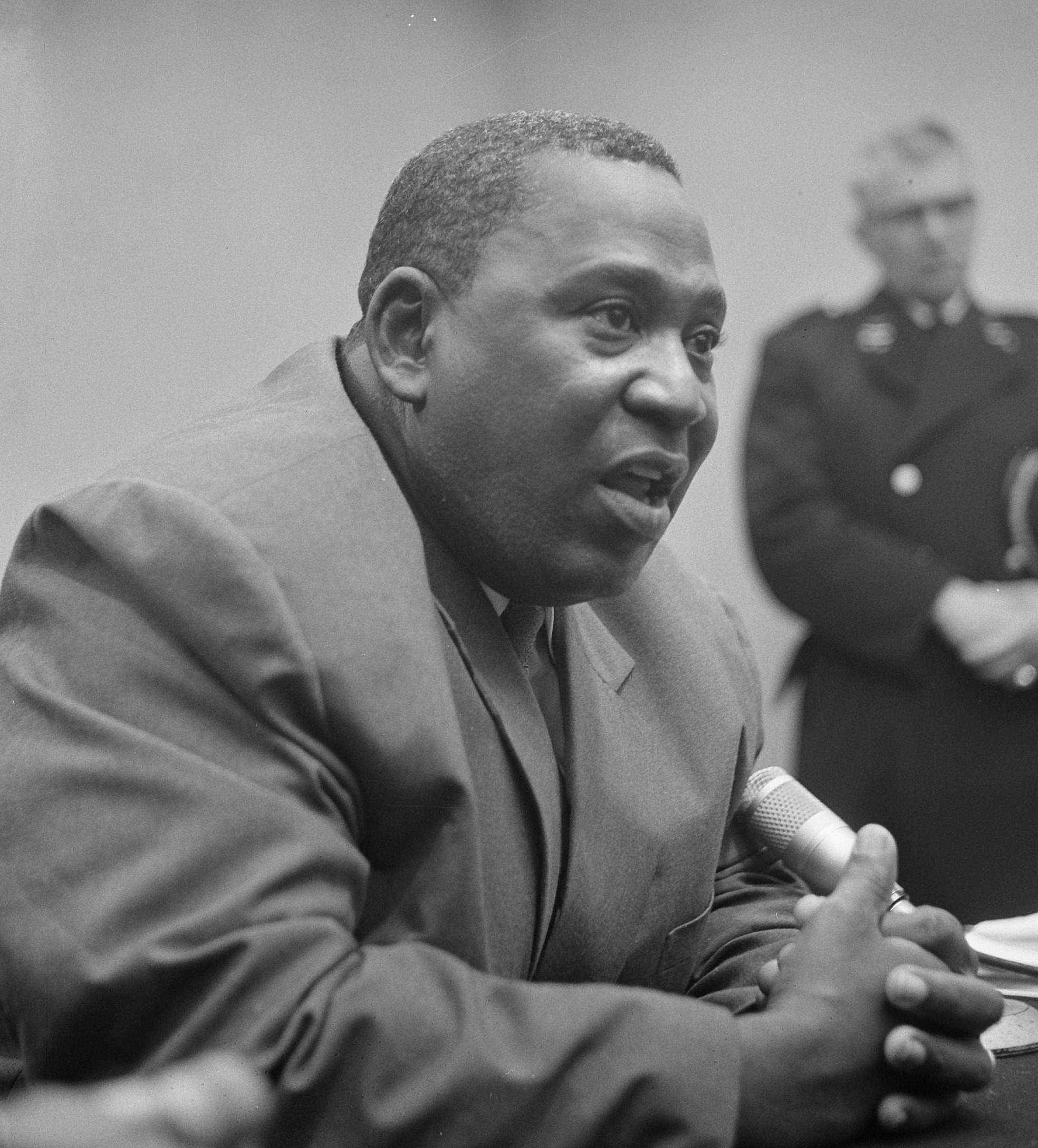 Minister-President Pengel van Suriname in Nederland aangekomen